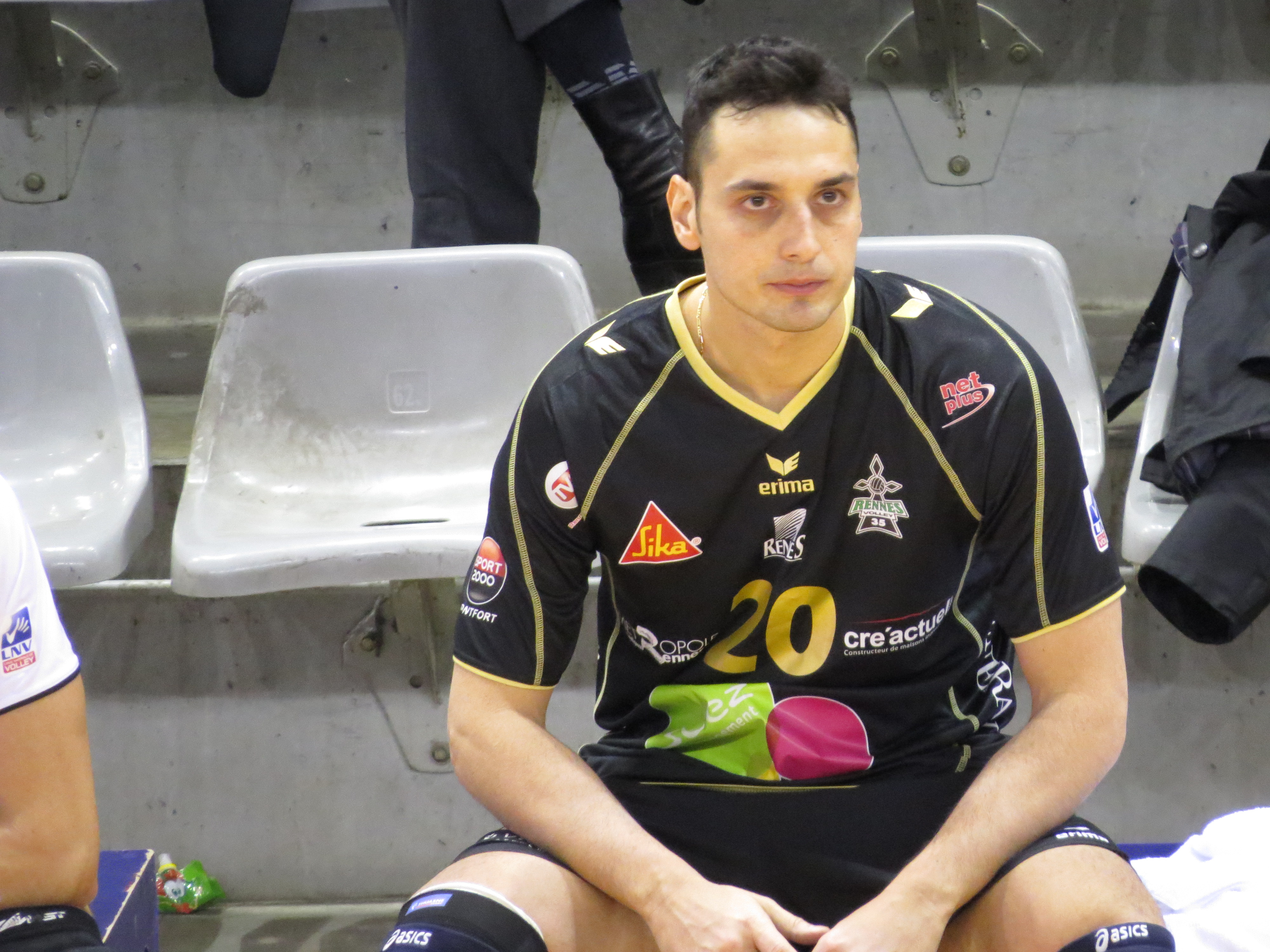 Match du championnat de France de division 1 entre le Paris Volley et Rennes